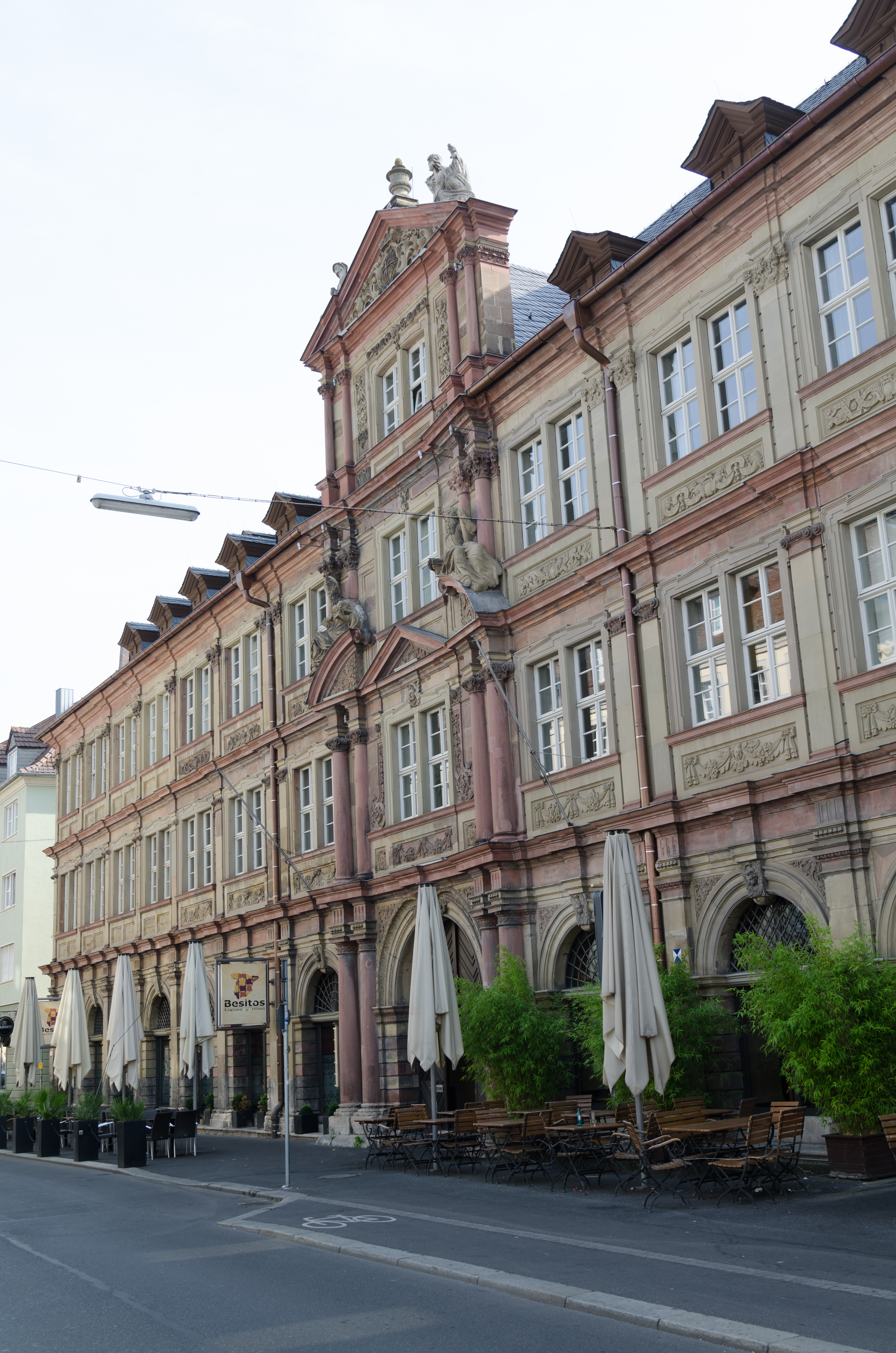 Würzburg, Karmelitenstraße 20